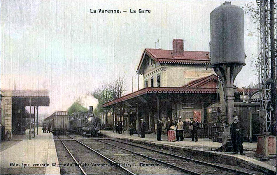 La gare de La Varenne, Val-de-Marne, France.